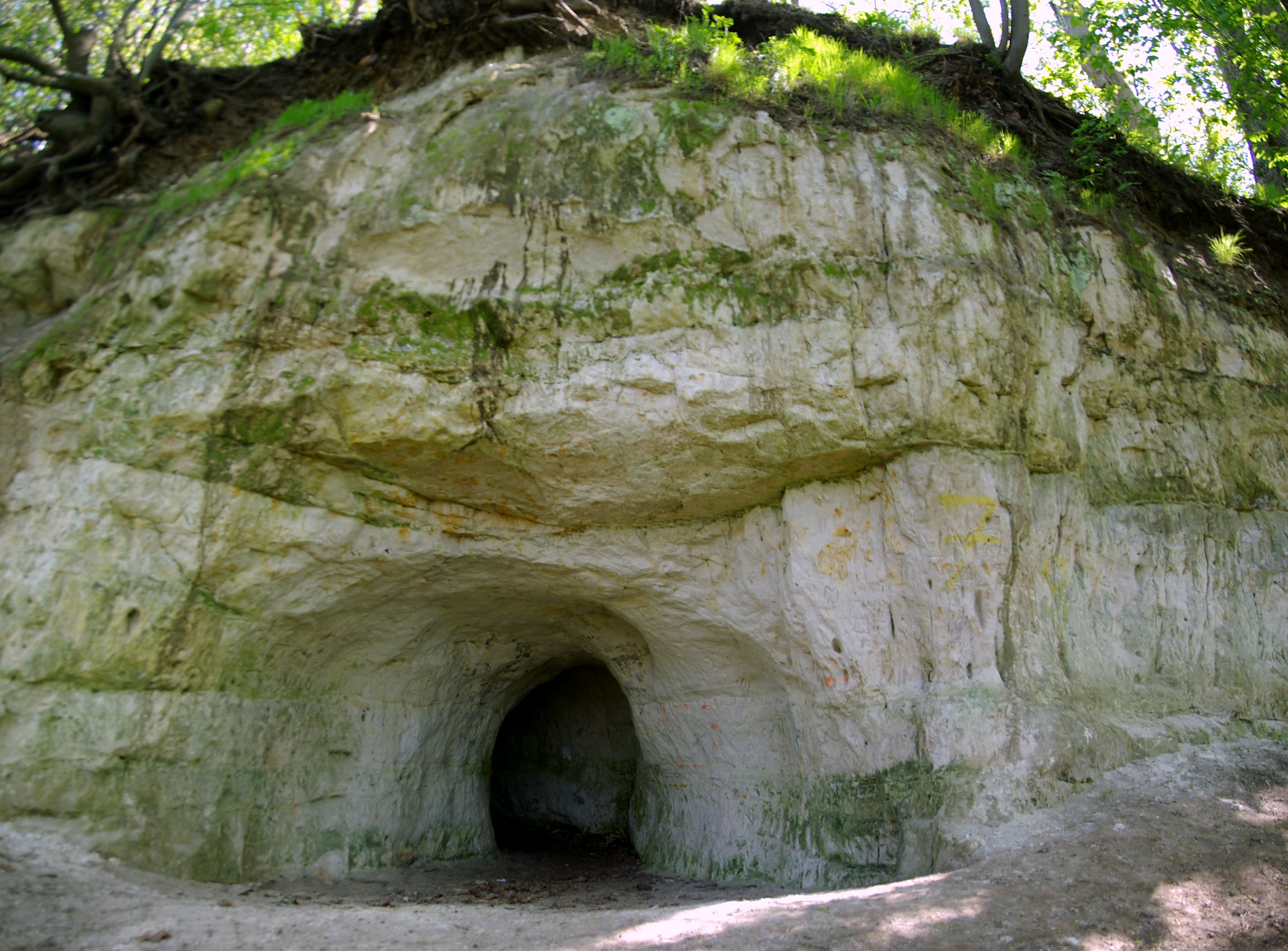 Koobas Harju maakonnas Viimsi vallas Lubja külas